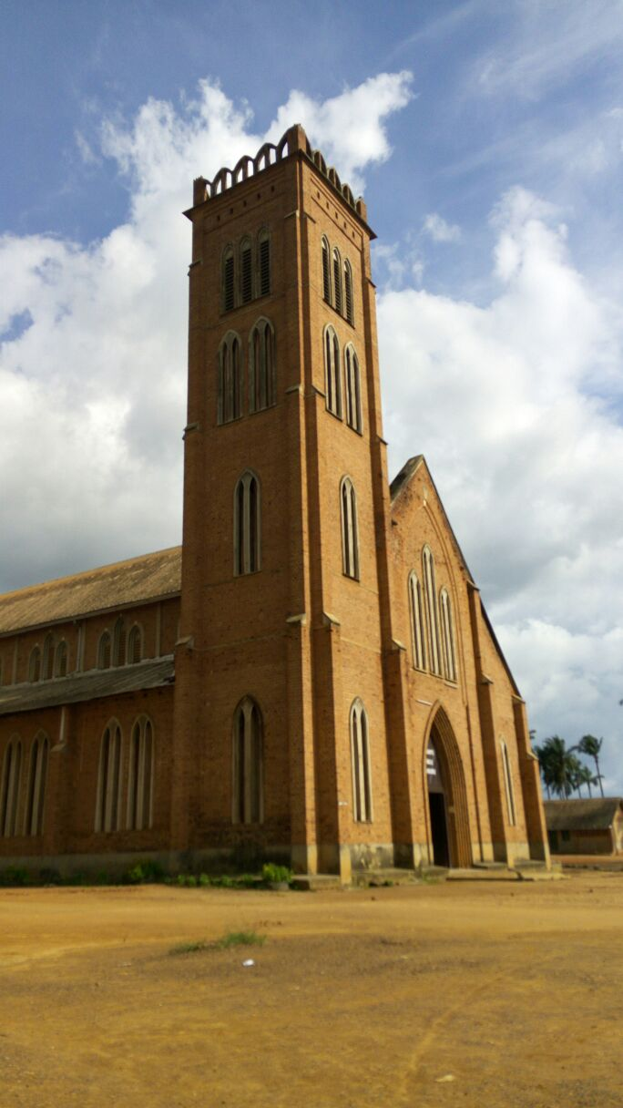 Image de devant de la cathédrale à Mbalmayo This is an image from Cameroon